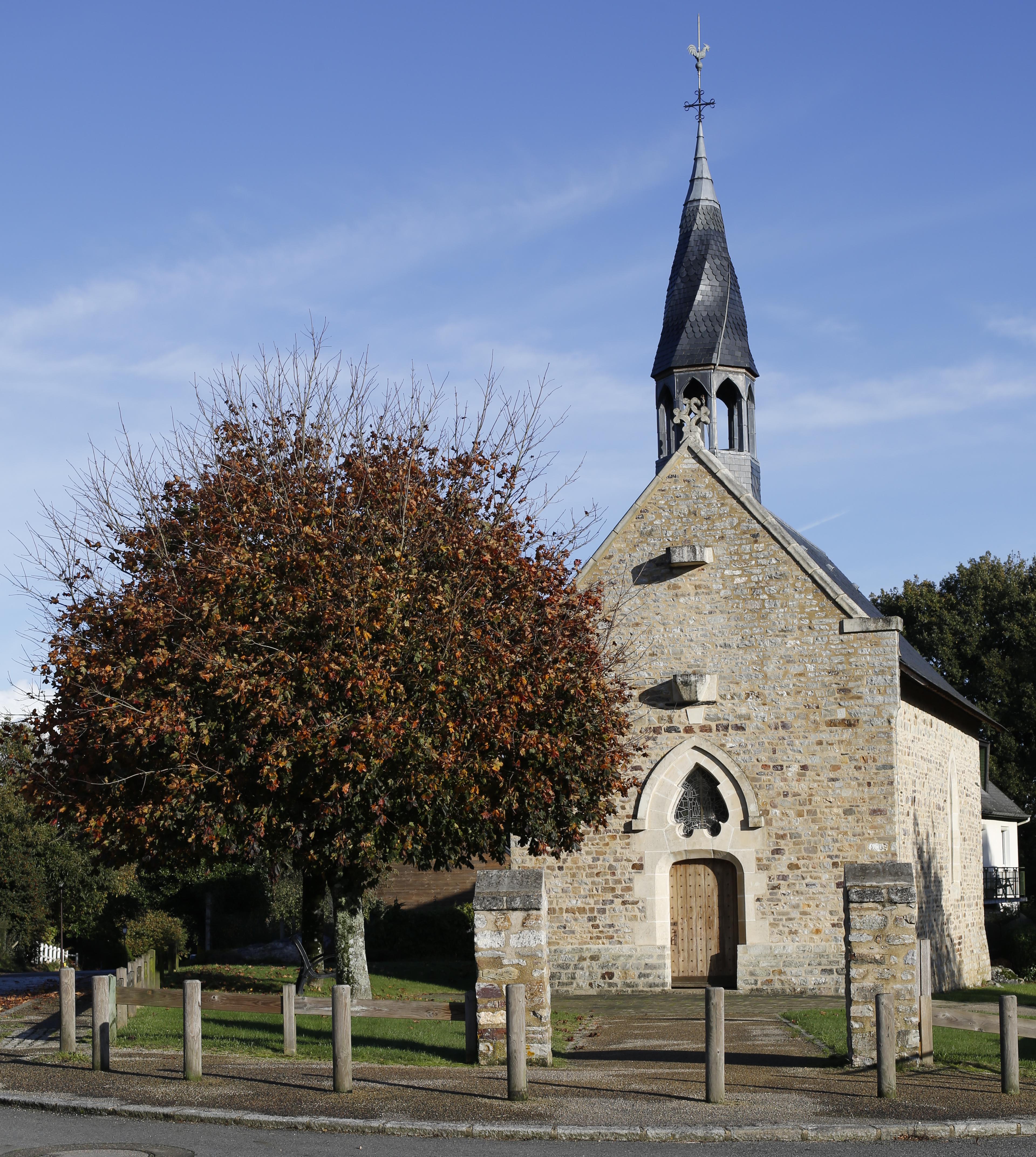 La chapelle Saint-Melaine de Pancé, construite par Arthur Regnault.